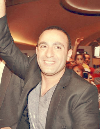 احمد عز واحمد السقا فى افتتاح فيلم المصلحة بدبى - مايو 2012